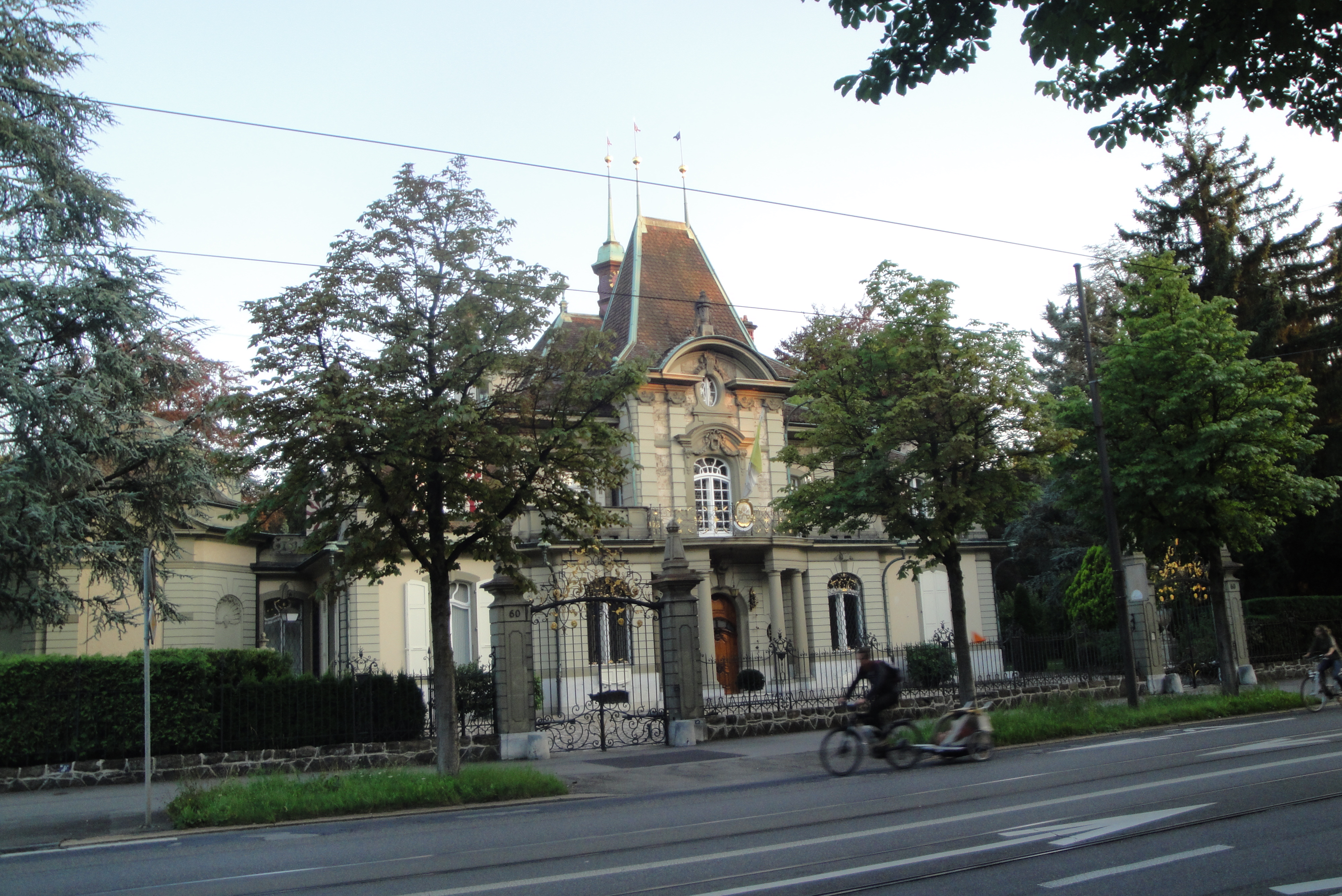 Bern, Thunplatz, Villa des päpstlichen Nutius; auch bekannt als Villa "Le Souvenir". - Adresse Thunstrasse 60